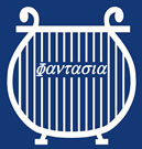 東京荒川少年少女合唱隊